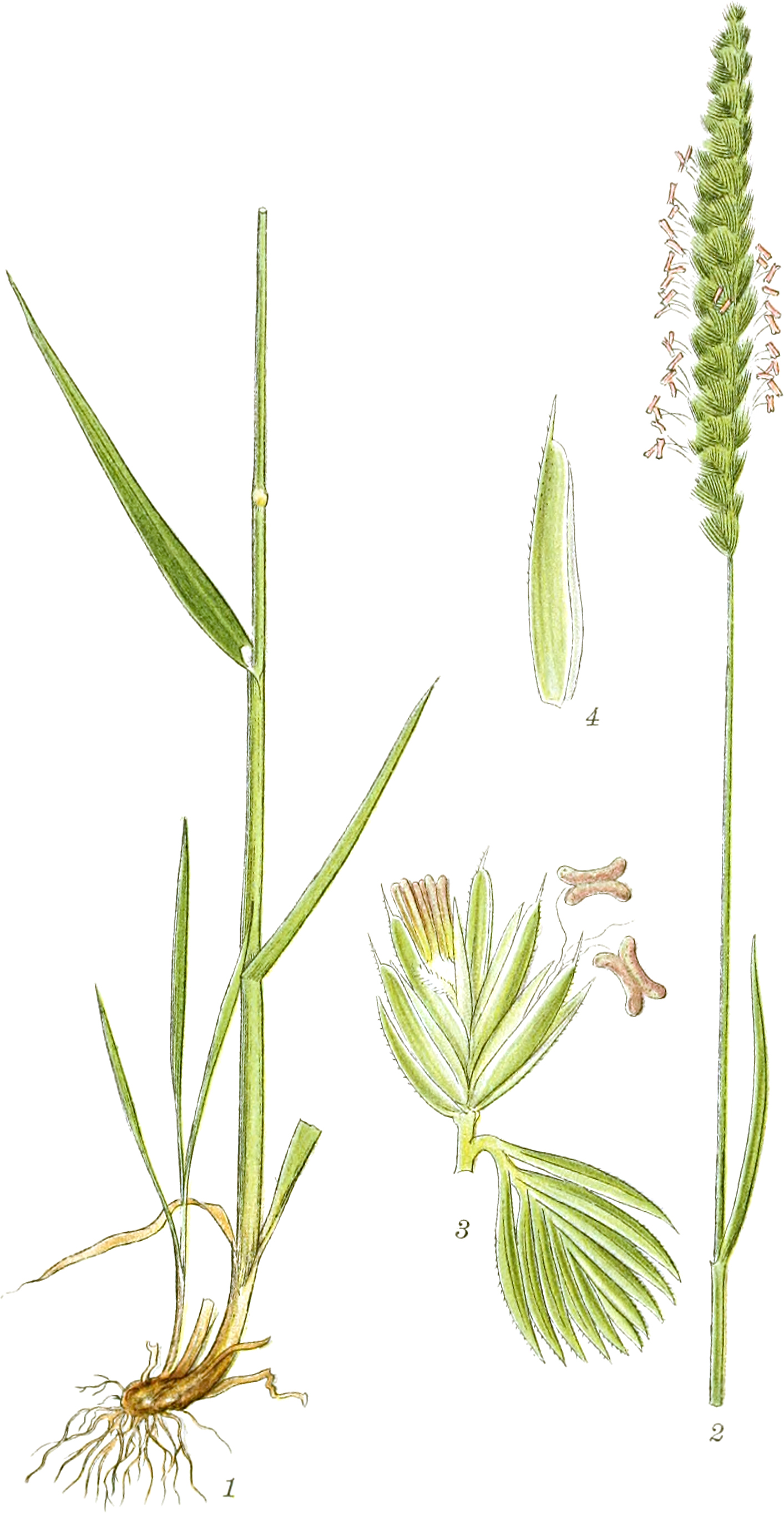 Mentz, A.; Ostenfeld, C. H.: Bilder der Nordflora. Band 2, 1917ff.Kammgras. Cynosurus cristatusTaf. 448. Abb. 1. Wurzelstock mit dem unteren Teil eines Strohhalms und vegetativen Trieben. Abb. 2. Scheinähre. Abb. 3. Ährchen mit dem gekämmten-Blatt (eigentlich ein verwandeltes und karges Ährchen; 6/1). Abb. 4. Deckspelze (8/1).